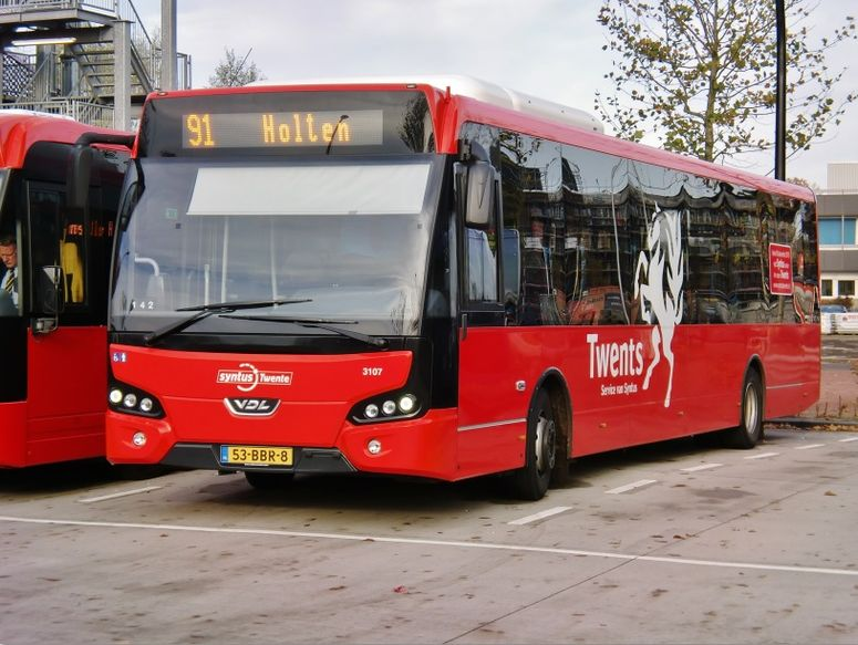 Amba 3107 van Syntus Twente